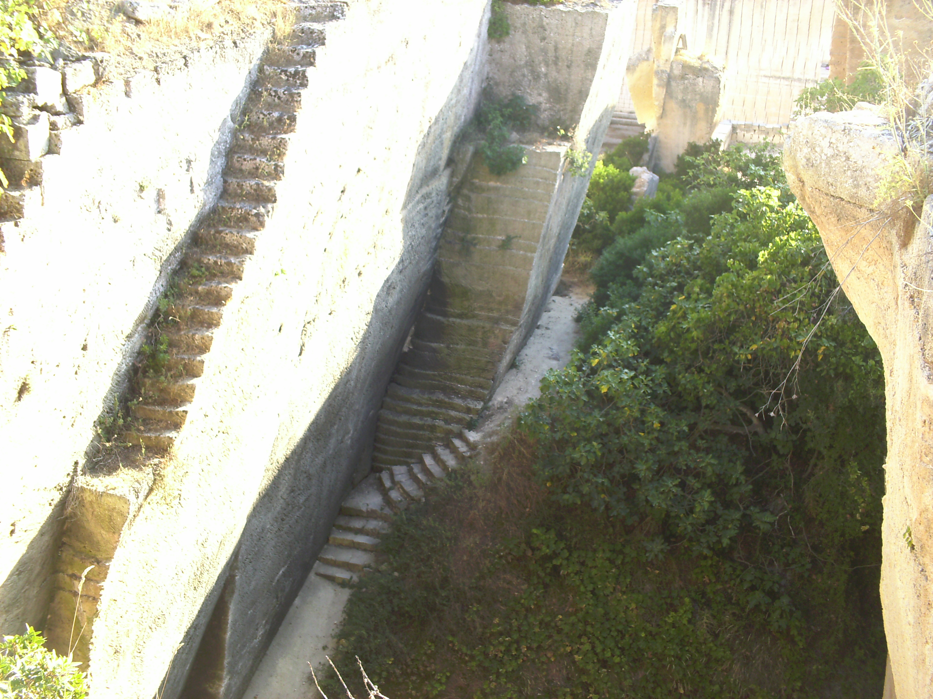 Pedreres de s'Hostal, Ciutadella, Menorca